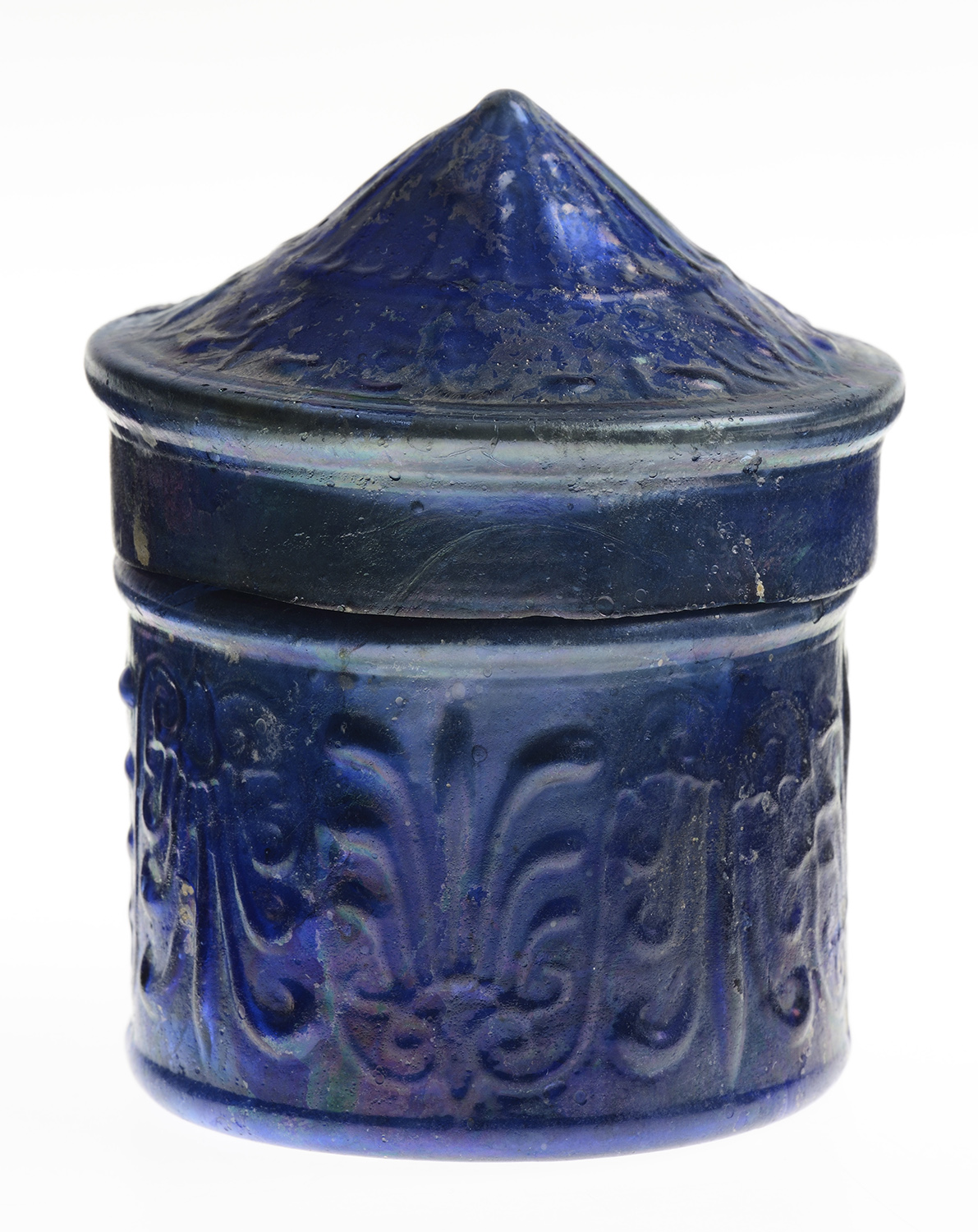 Pyxide: boîte à fard et à onguents ; on pouvait aussi y ranger de petits objets de toilette ou de parure.